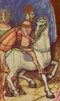 Václav III. přijíždí do Uher